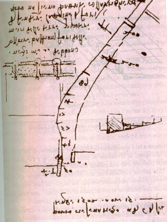 Dessin du port de Cesenatico (Italie) par Léonard de Vinci